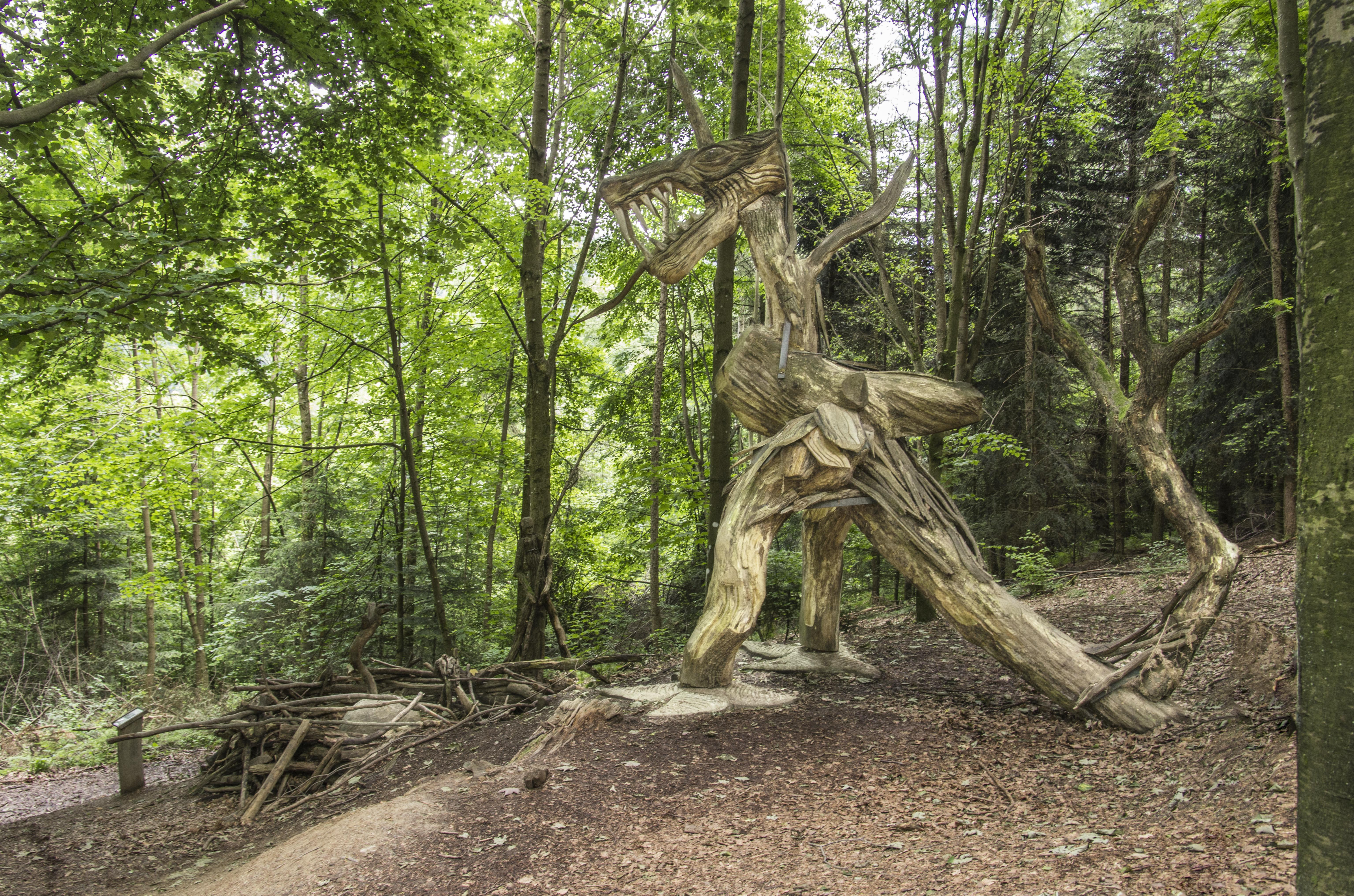 Skulpturen von Thomas Ress auf dem Skulpturenpfad in Freiburg